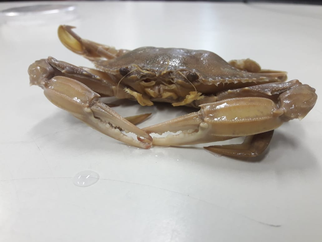 A foto tirada no laboratório de microscopia da Universdade de São Paulo apresenta um caranguejo da ordem Decapoda, Pleocyemata, Brachyura) em vista frontal como representante da classe de malacostracos.